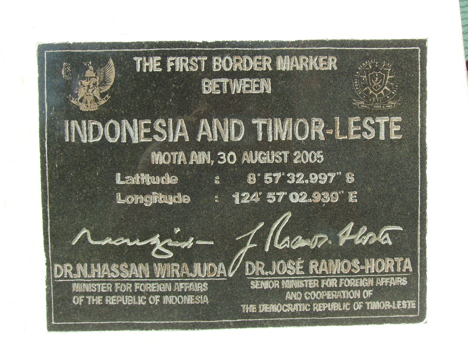 Plaque commémorative à la frontière entre le Timor oriental et l'Indonésie.